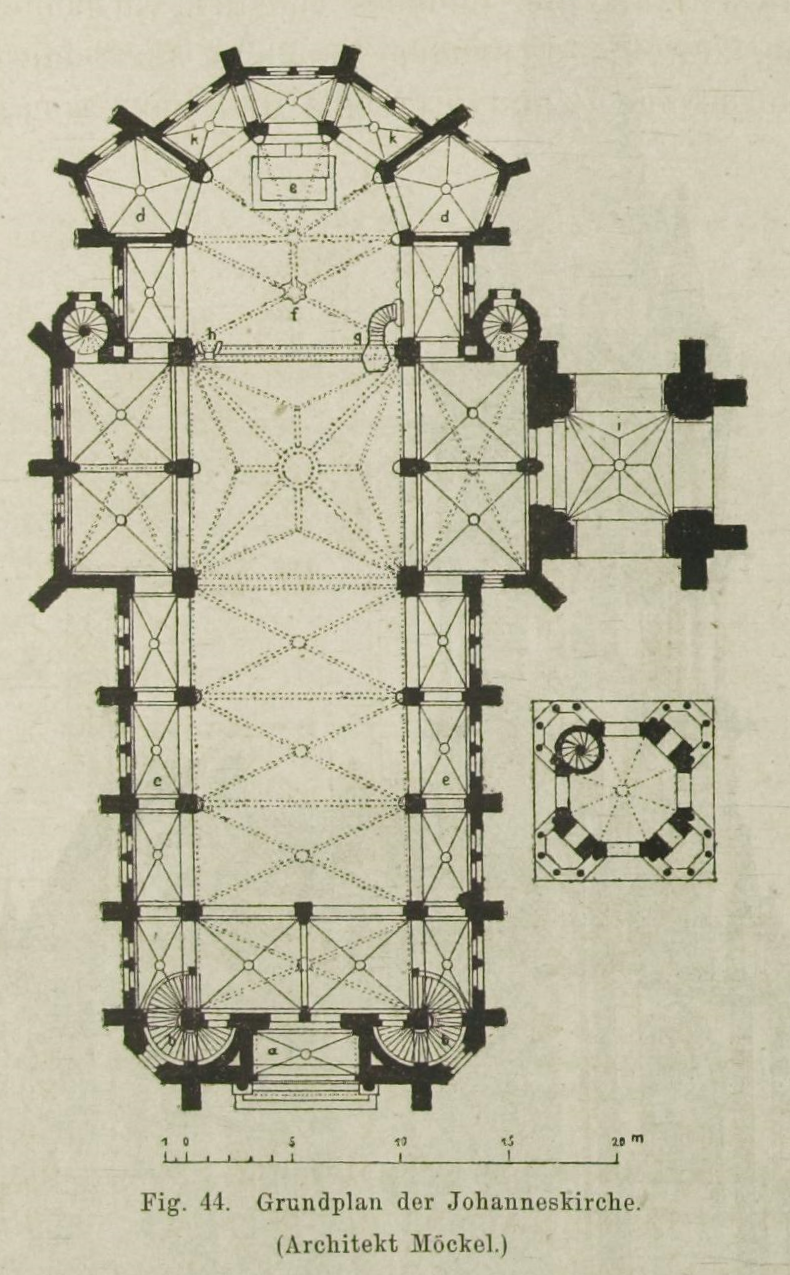 Grundriss der Johanneskirche Dresden aus: Die Bauten, technischen und industriellen Anlagen von Dresden. Herausgegeben vom Sächs. Ingenieur- und Architekten-Verein und vom Dresdener Architekten-Verein. Meinhold, Dresden 1878